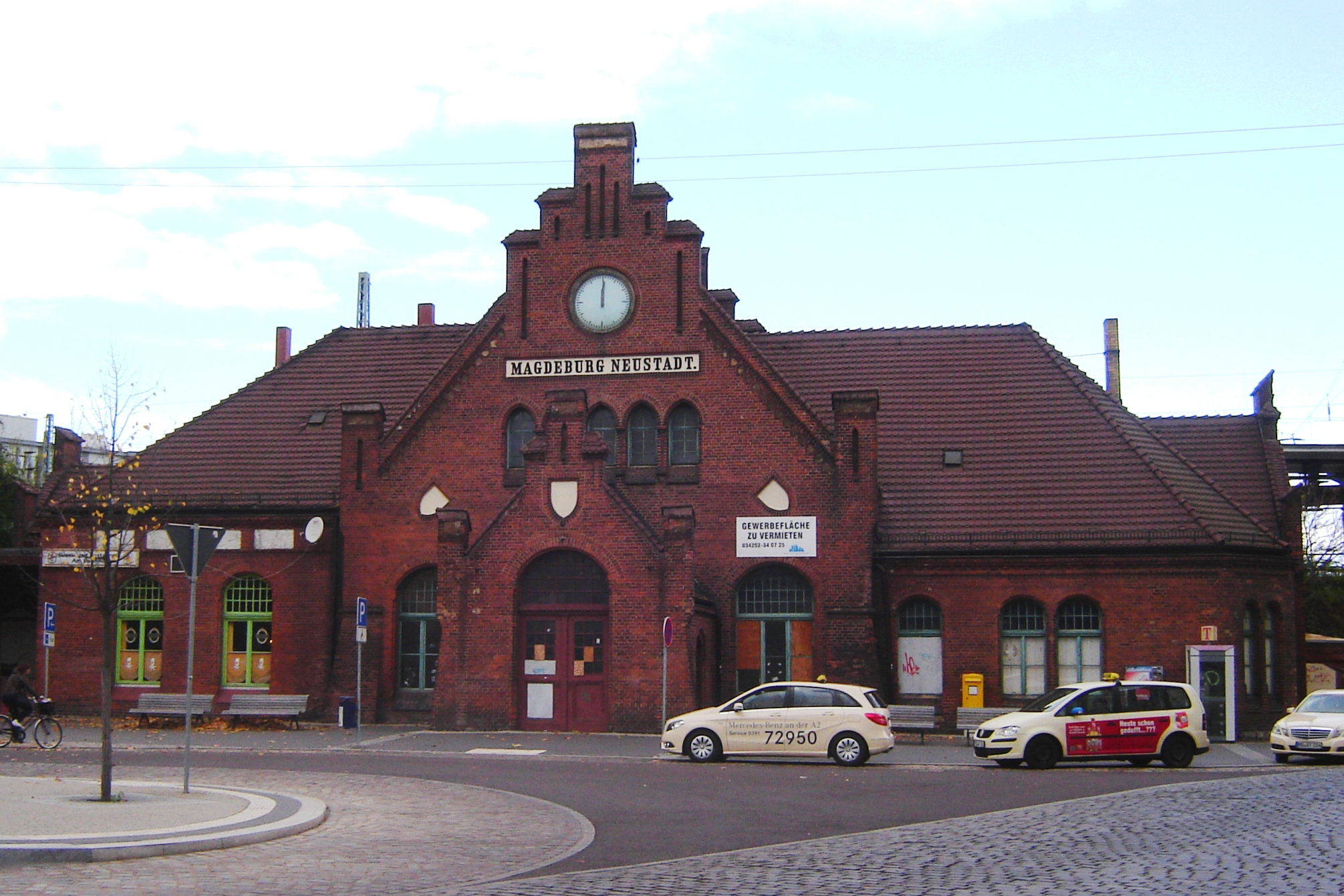 Magdeburg Bahnhof Neustadt (Kulturdenkmal)